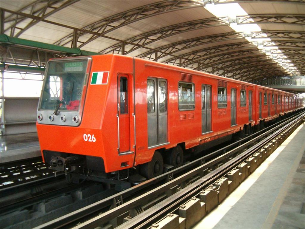 Uno de los primeros convoyes del Metro de la Ciudad de México, modelo MP68 R93, rehabilitado por Bombardier en 1994, circulando en la Línea B de este sistema.